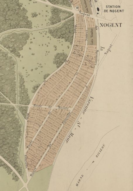 Nogent-sur-Marne.Route de Joinville.Lotissements.XIXe siecle